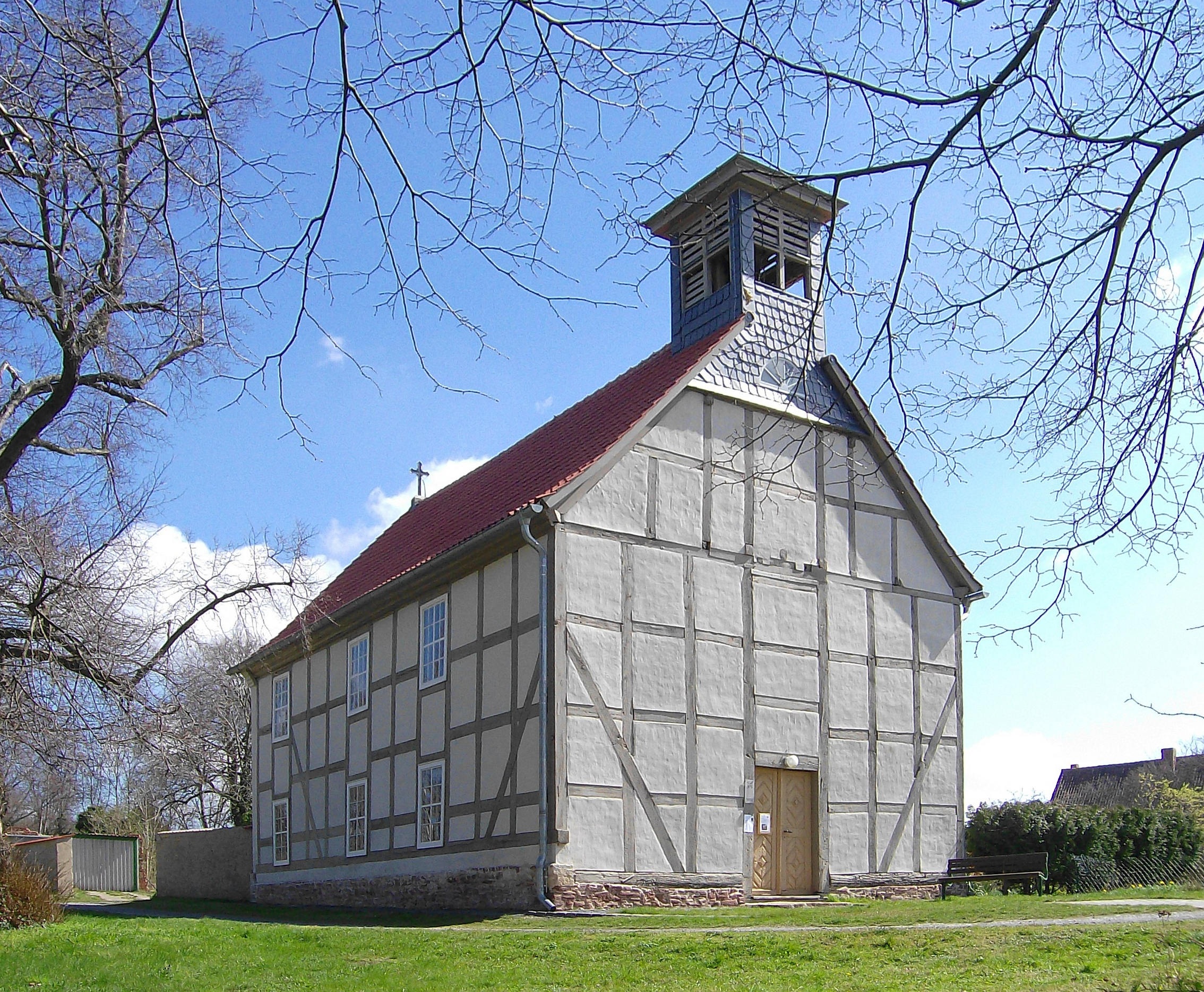 Neuplatendorf, Fachwerkkirche von 1781 im Jahr 2007